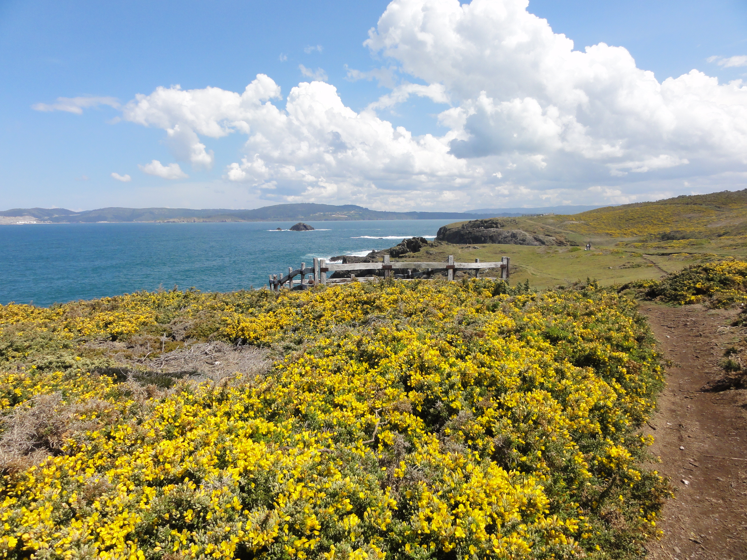 Costa de Dexo con tojo en flor This is a photography of a Site of Community Importance in Spain with the ID: ES1110009. Natura2000 entry, EEA entry